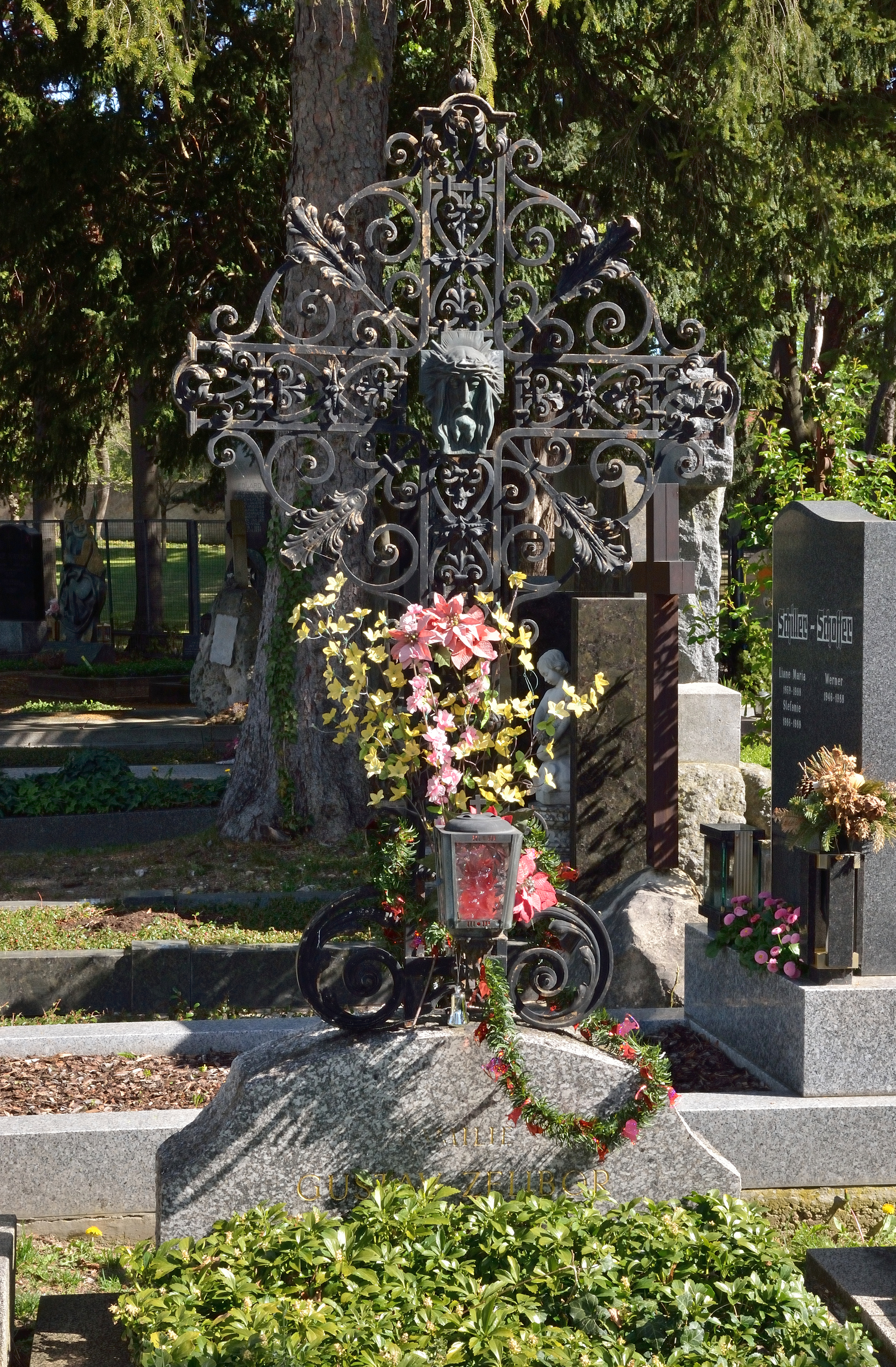 Das Grabmal von Gustav Zelibor liegt auf dem Hietzinger Friedhof, Gruppe 49, Nr. 31.